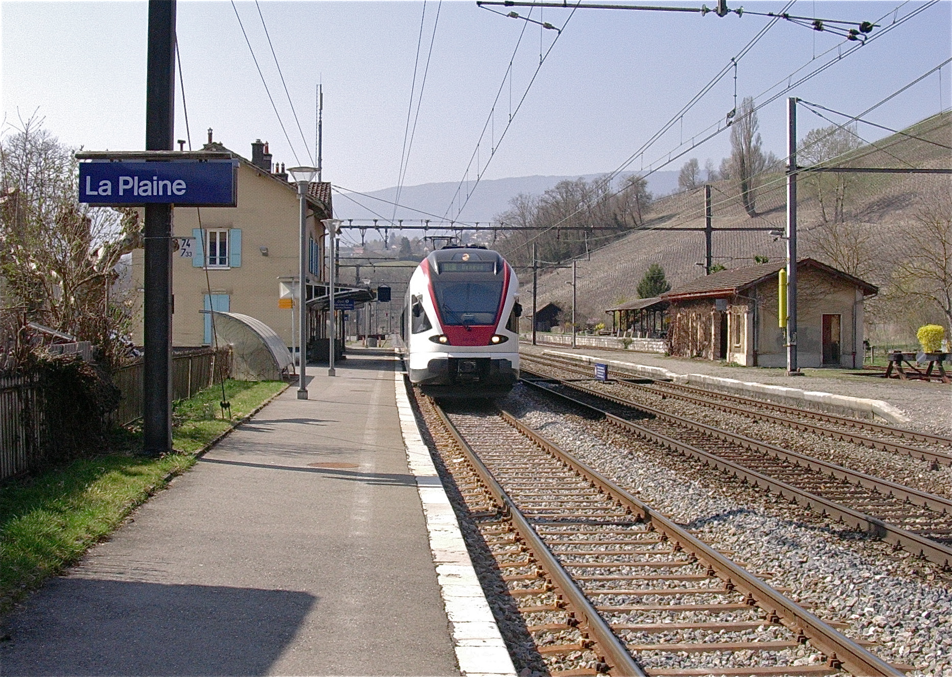 La gare de La Plaine, Canton de Genève